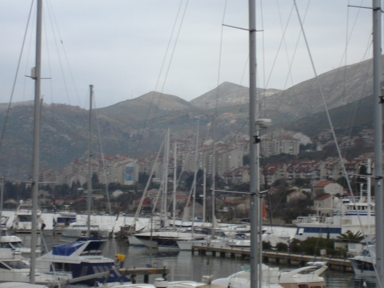 ACI Marina Dubrovnik